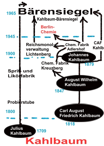 Gebäudeensemble der Kahlbaum-Sprit- und Likörfabrik